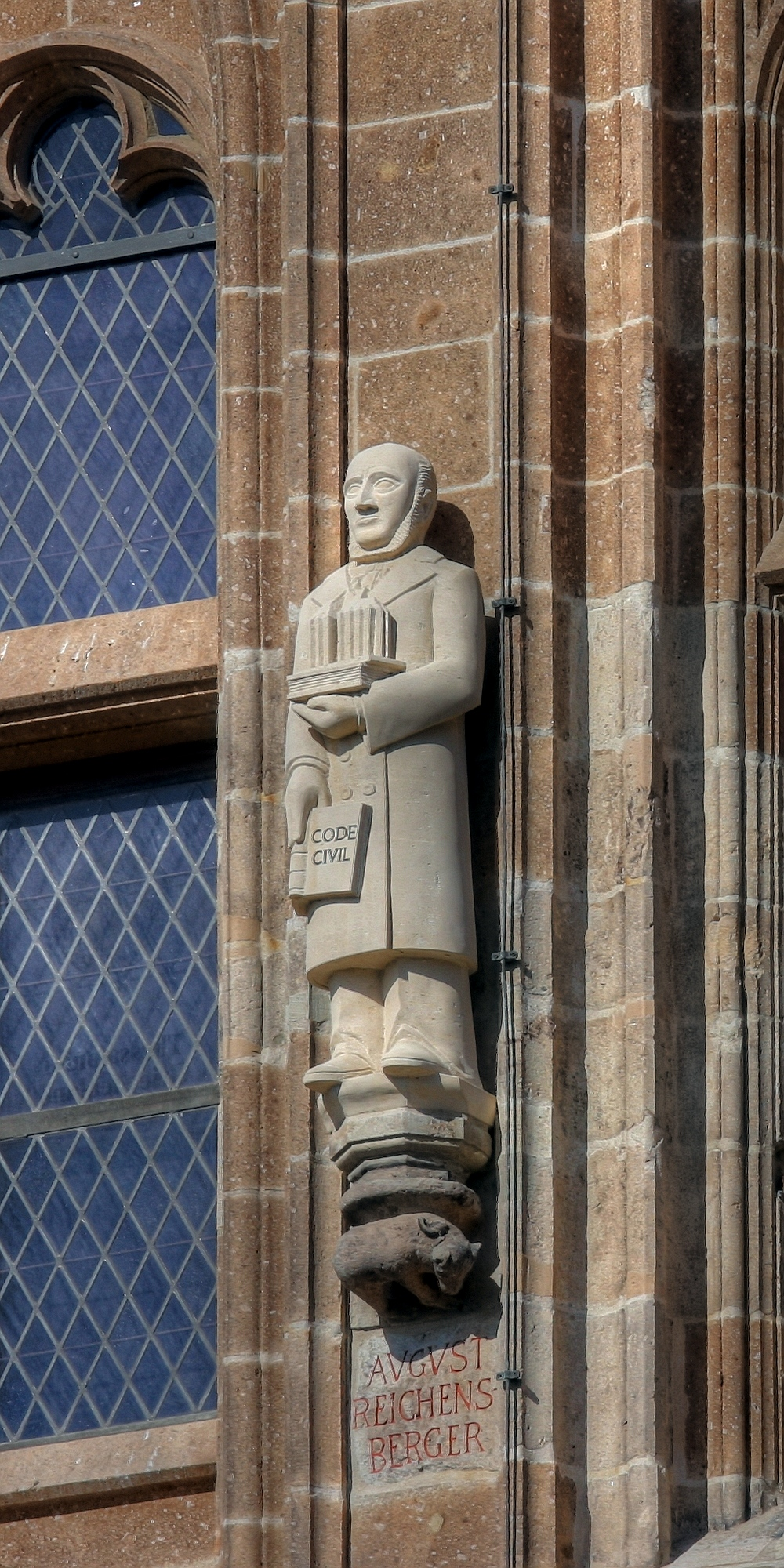 Rathausturm Köln mit der Figur des August Reichensperger Details zu der Statue: Bildhauer der Reichensperger-Statue: Hans-Otto Lohrengel Details zu der Konsole: Thema der Konsole unter der Reichensperger-Statue: „Bär“.